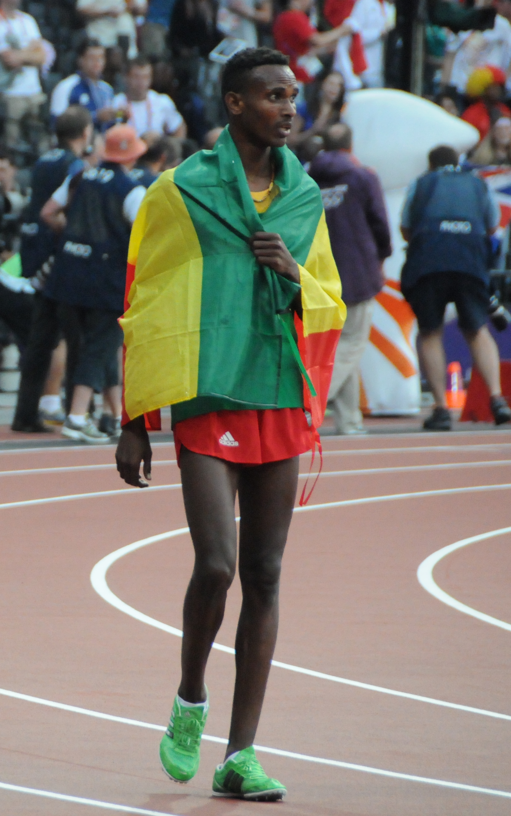 Les éthiopiens participants à la finale du 5000m de Londres.